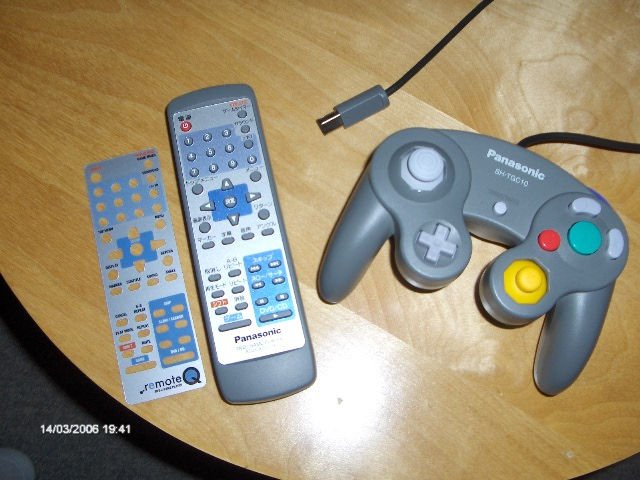 Controller en afstandsbediening van de Panasonic Q